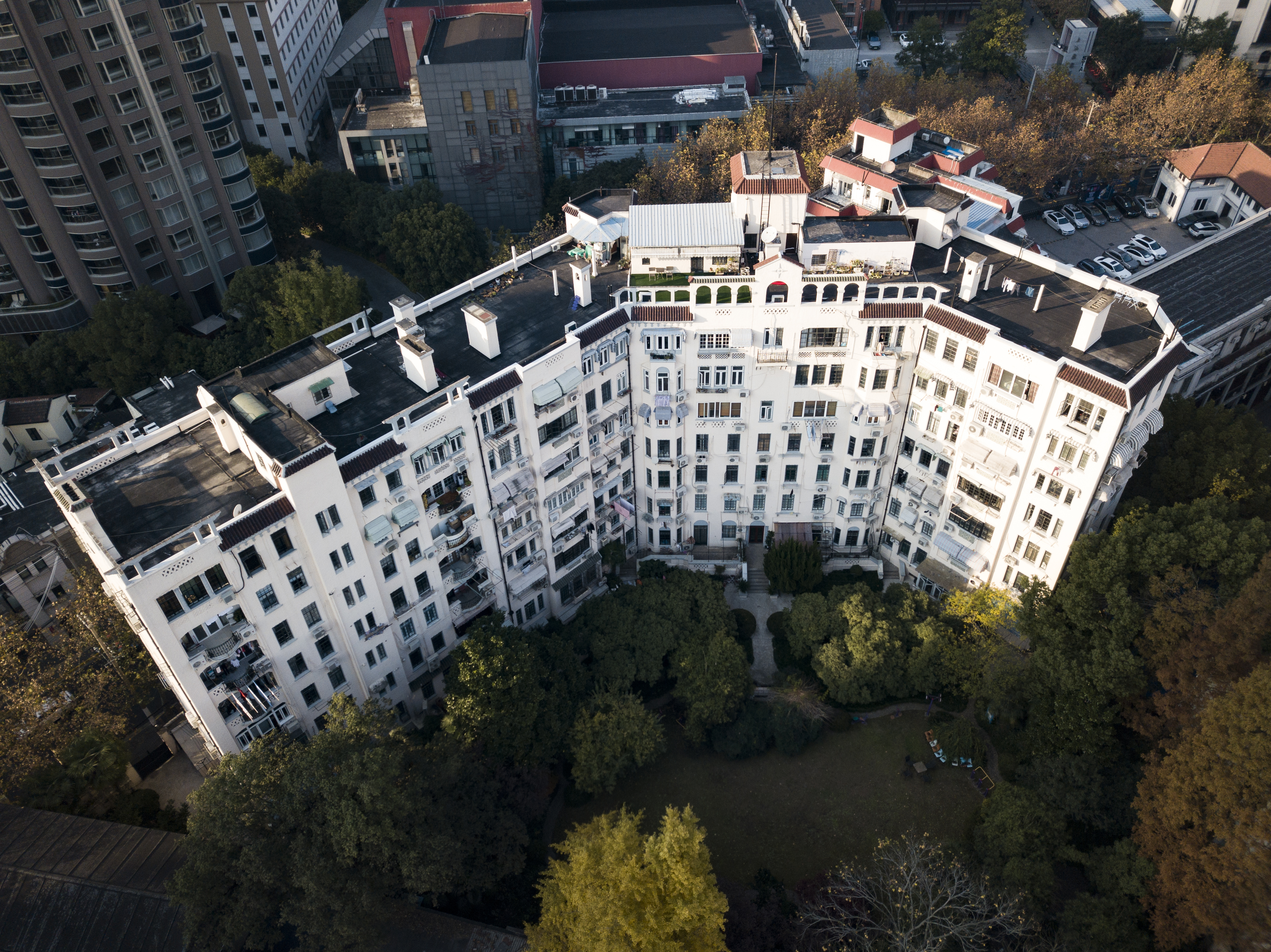 中文（中国大陆）: 枕流公寓·上海徐汇·俯拍